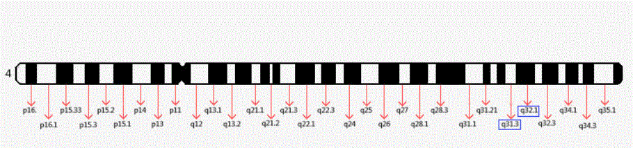 GENS FGB, FGA I FGG